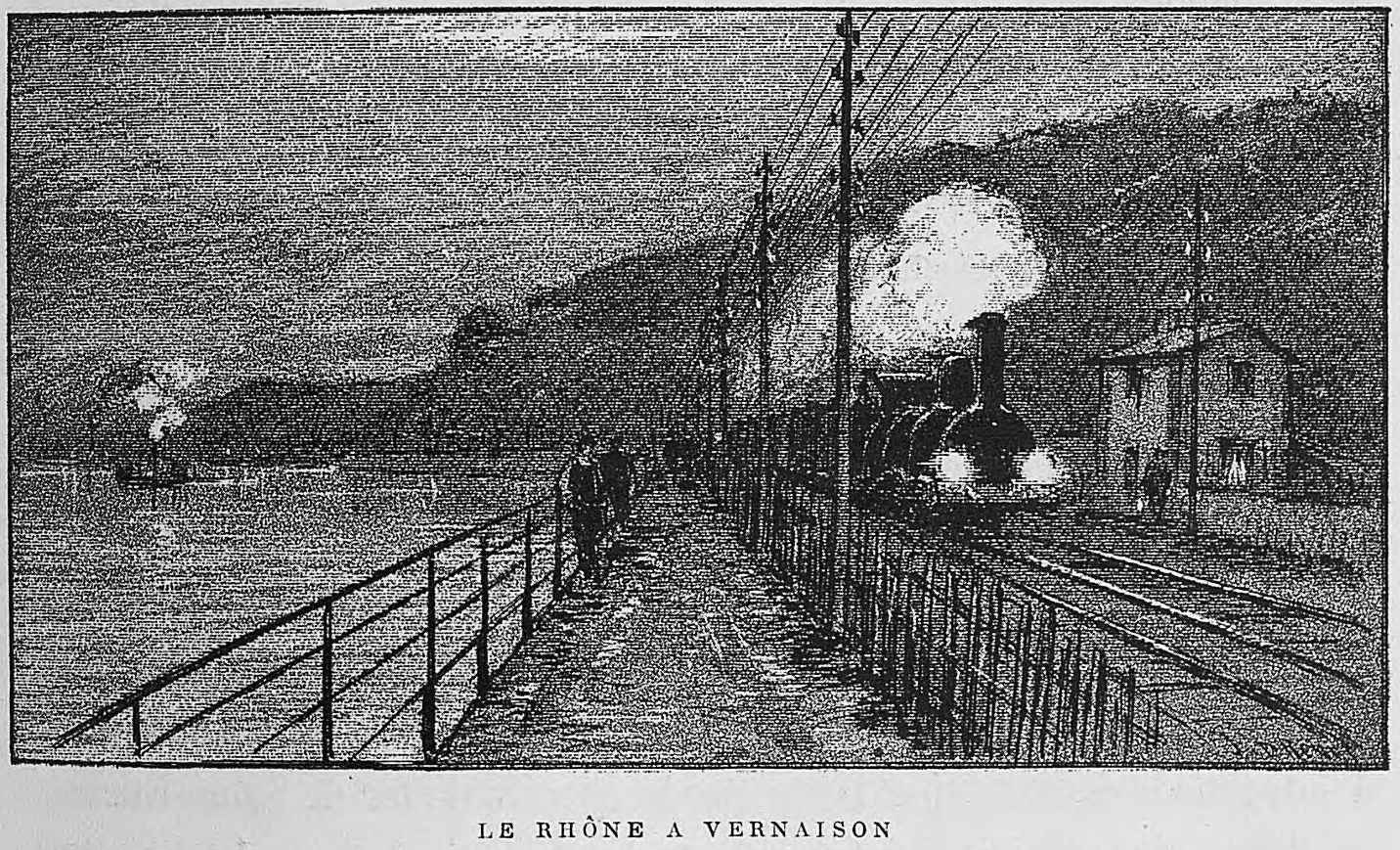 Aux environs de Lyon / Monsieur Josse ; préface de M. Coste-Labaume ; édition illustrée de 250 dessins de J. Drevet.